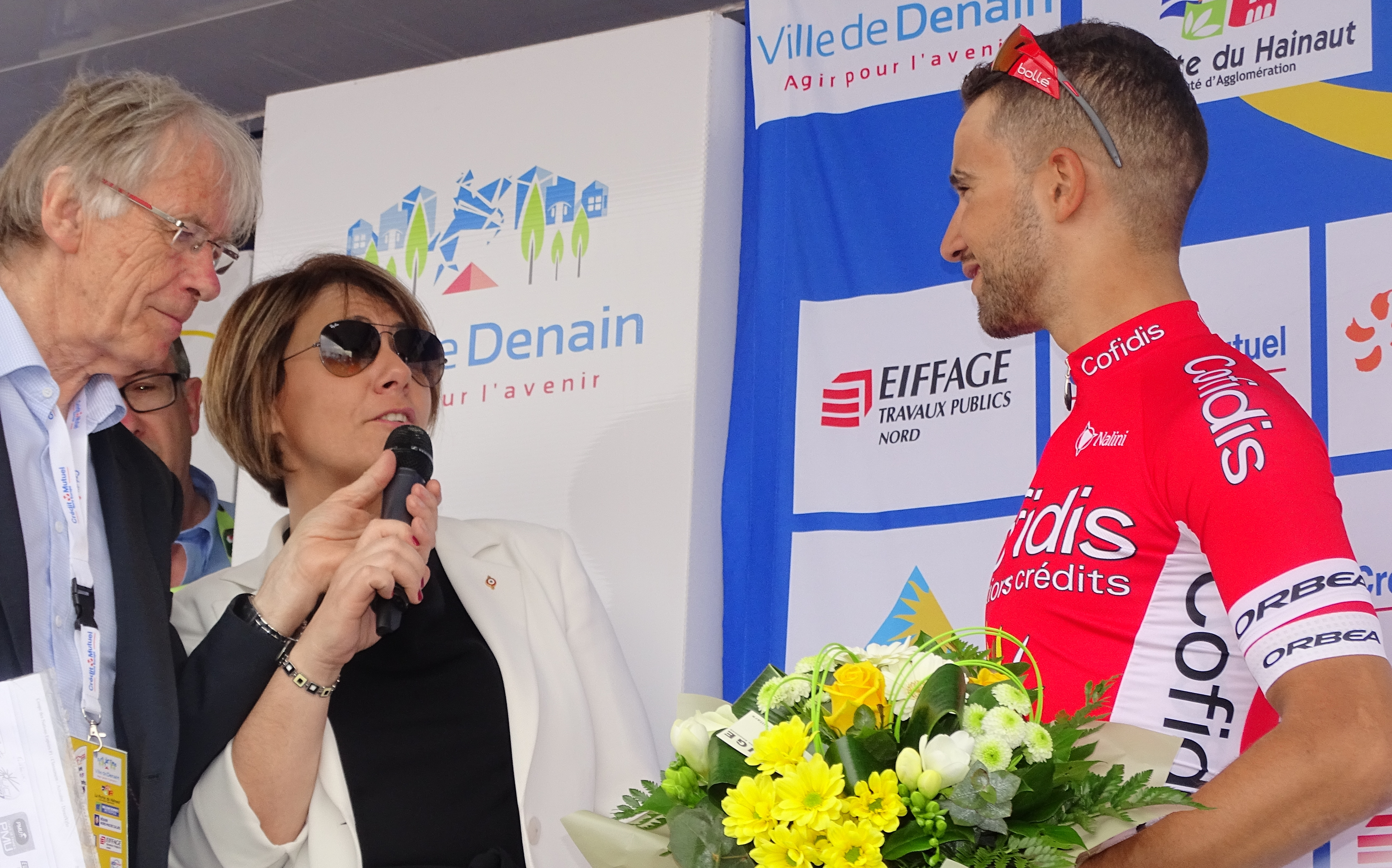 Reportage réalisé le jeudi 16 avril à l'occasion du départ et de l'arrivée du Grand Prix de Denain 2015 à Denain, Nord, Nord-Pas-de-Calais, France.